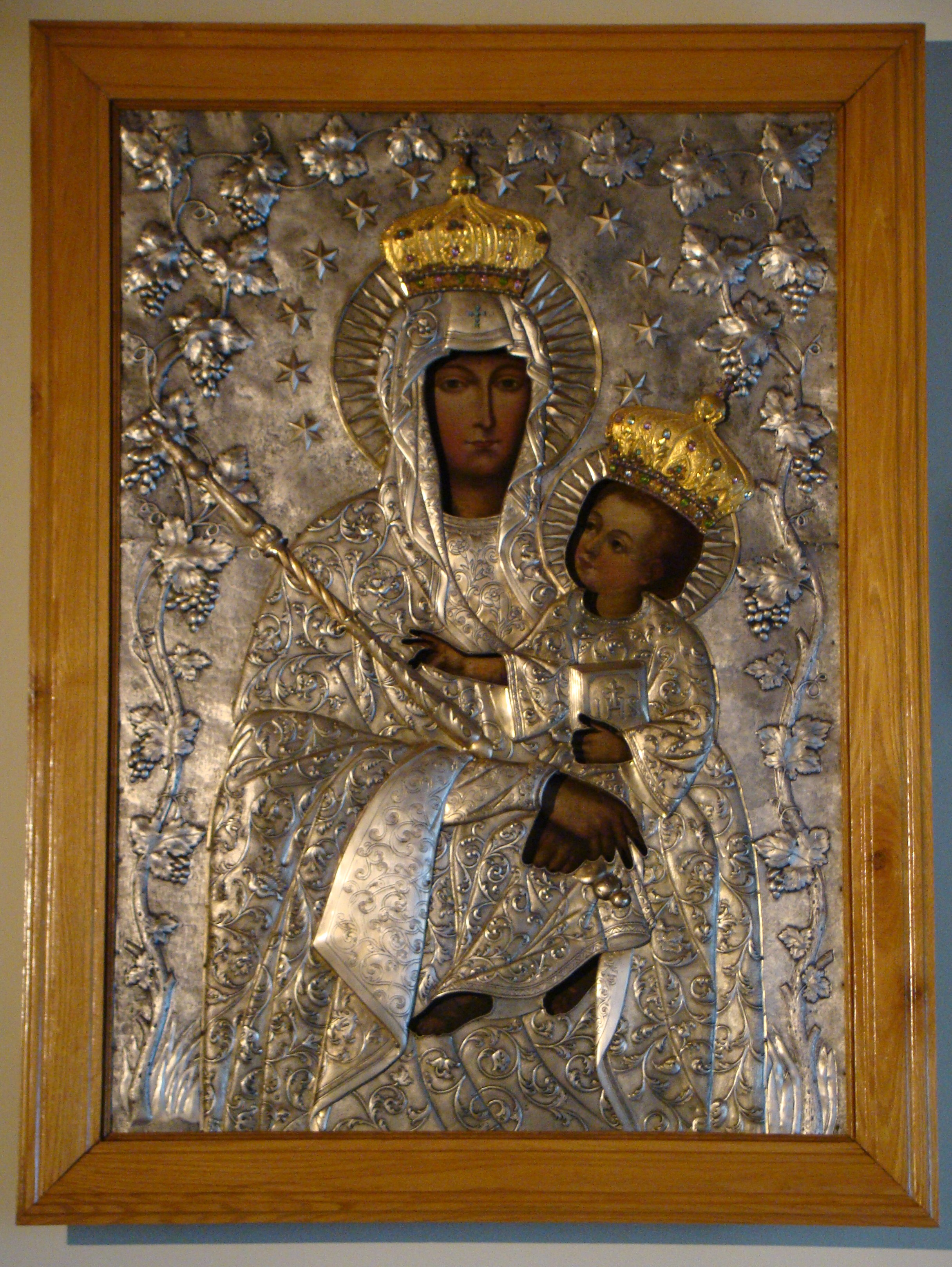 Cudowny Obraz Matki Bożej Latyczowskiej